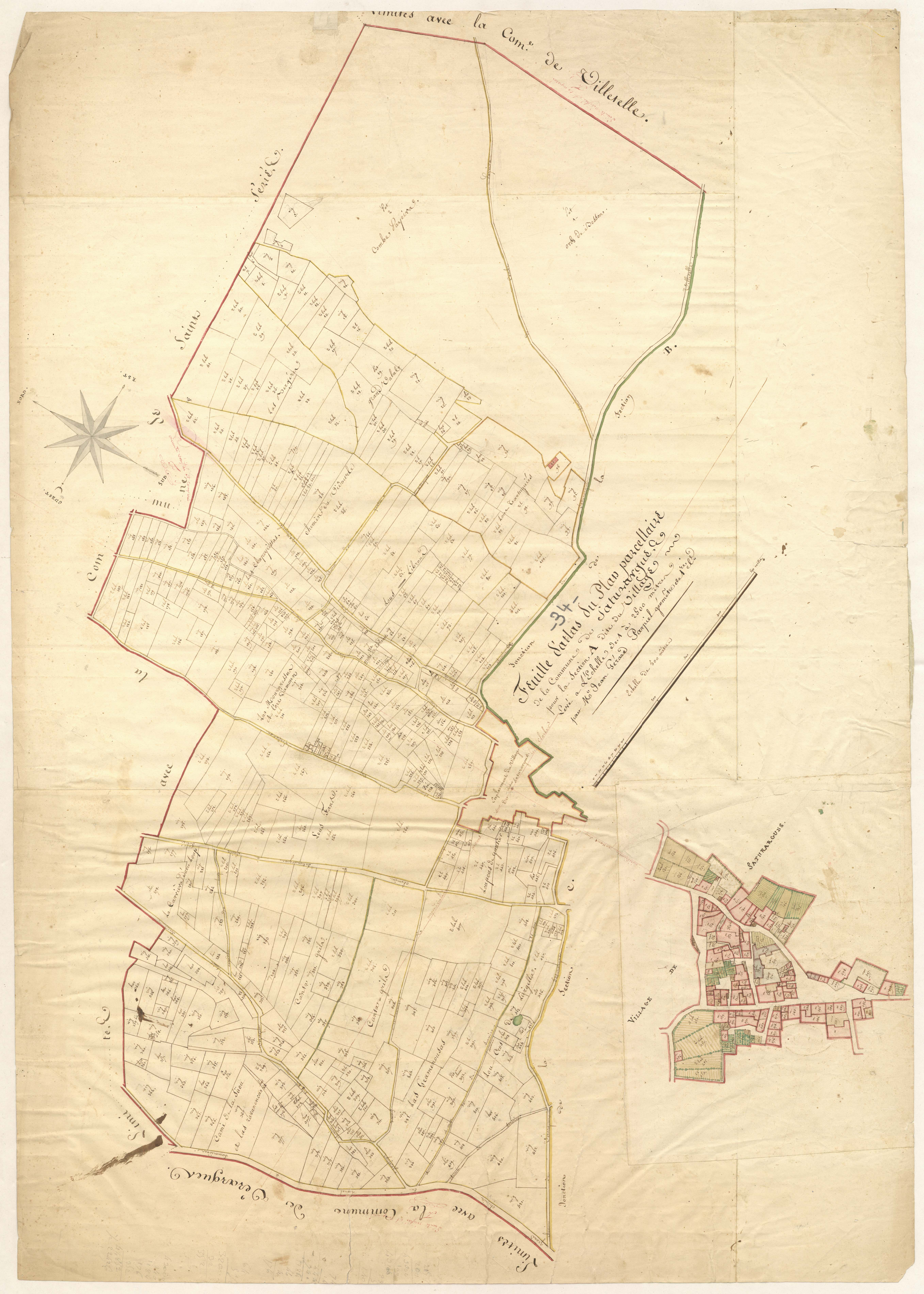 Saturargues. - Cadastre napoléonien : plan de la section A du Village, avec le développement du village au 1/1250 ème